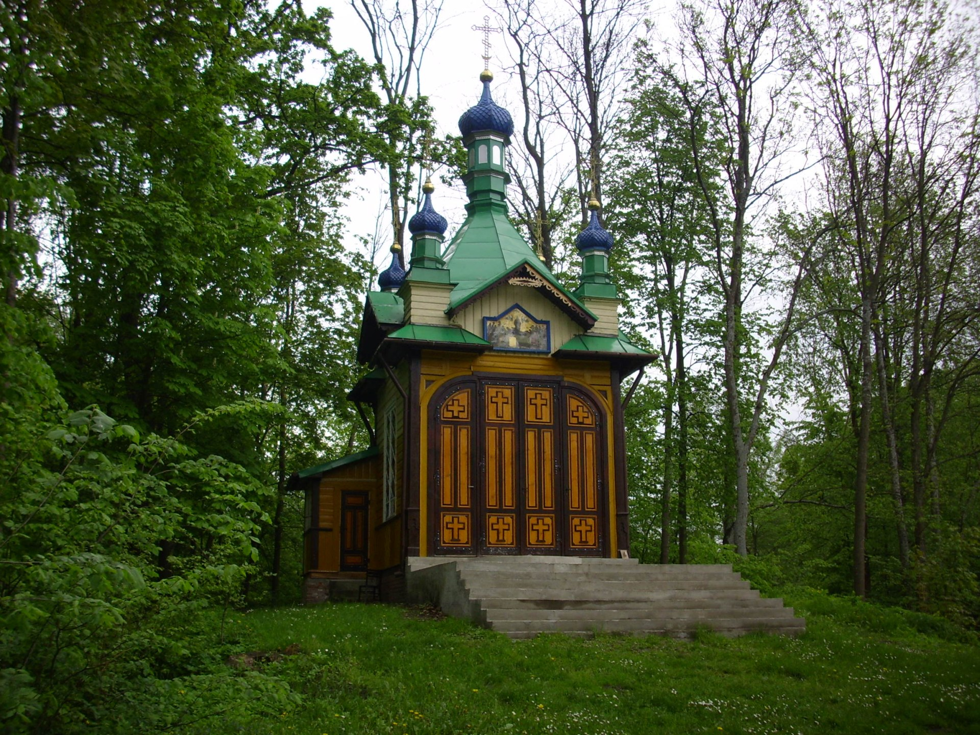 Kaplica pw. Zaśnięcia Najświętszej Marii Panny z roku 1906 przy monasterze św. Onufrego w Jabłecznej.